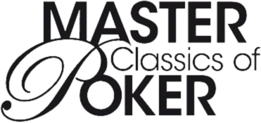 Logo der Master Classics of Poker